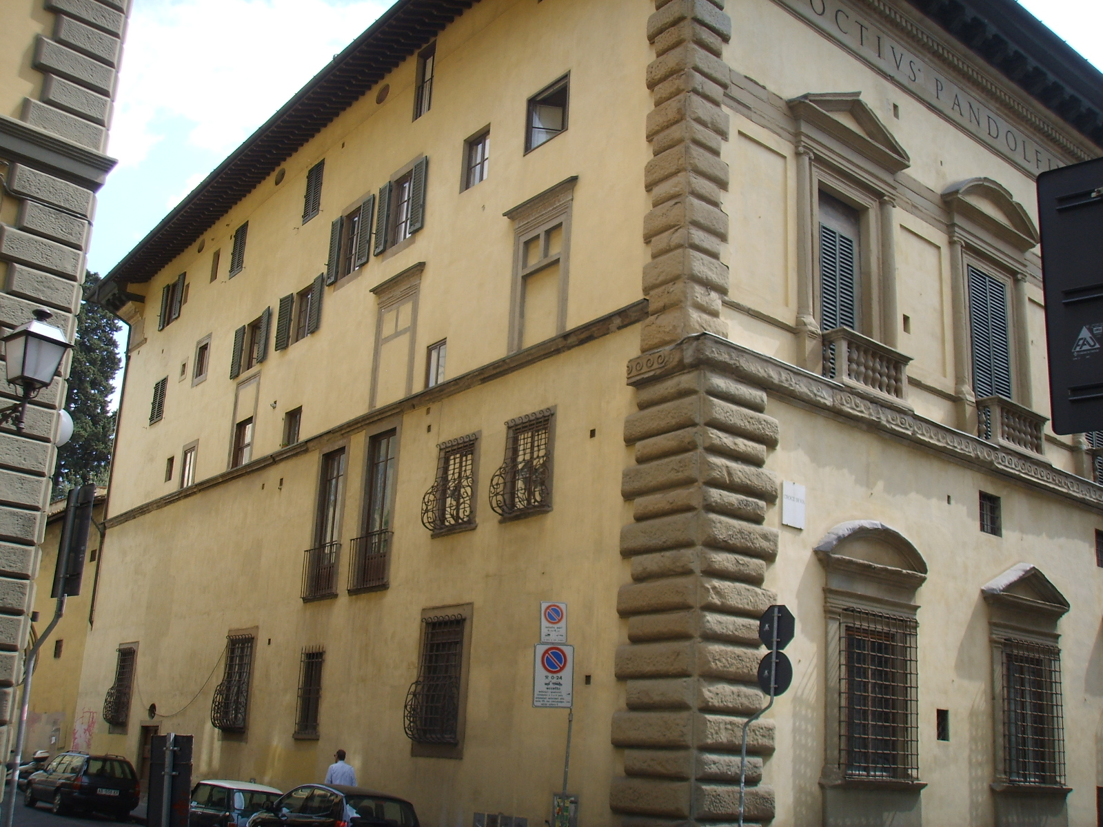 Palazzo Pandolfini, view